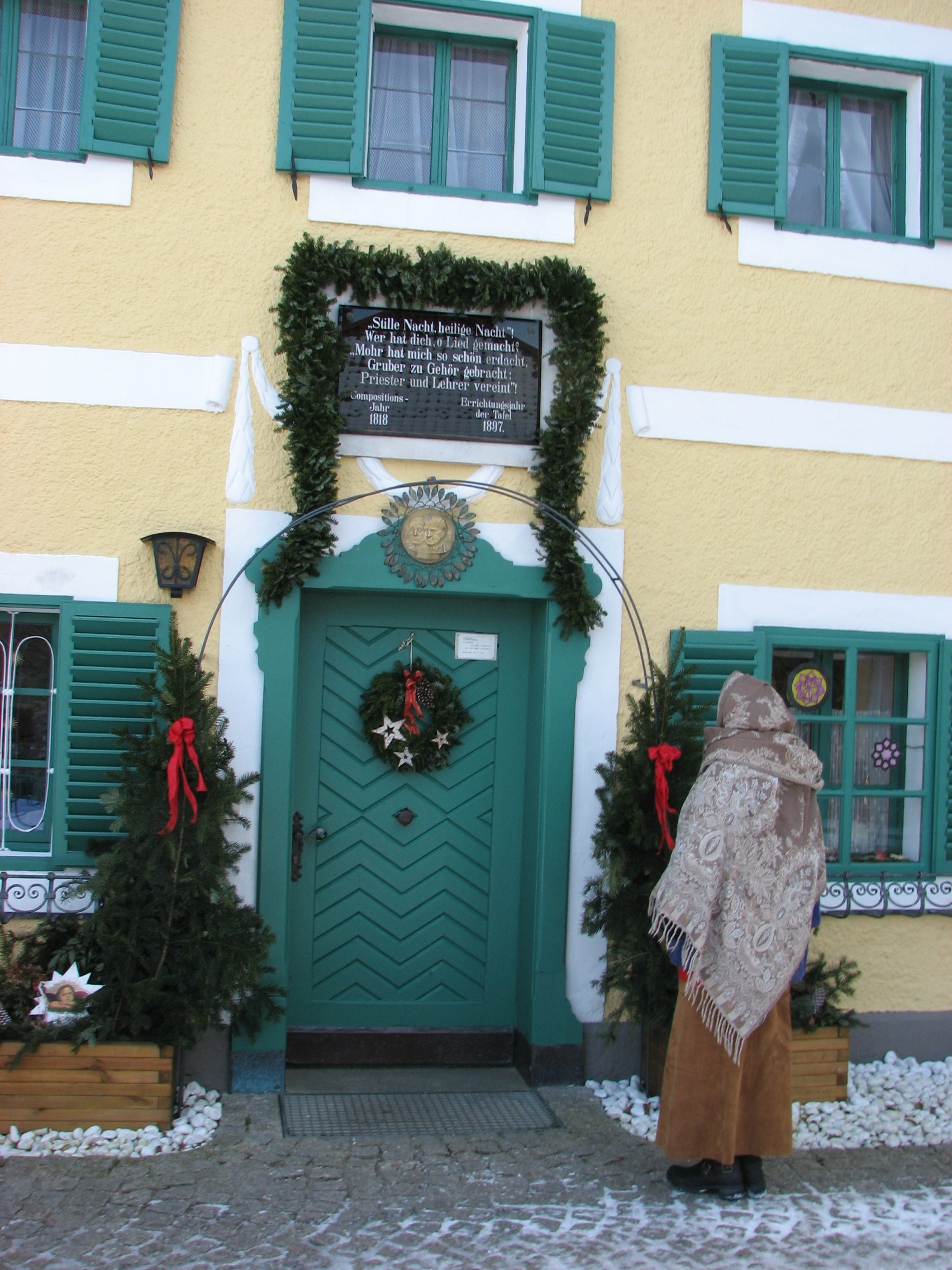 Hallein, F.X. Gruber home, school, museum